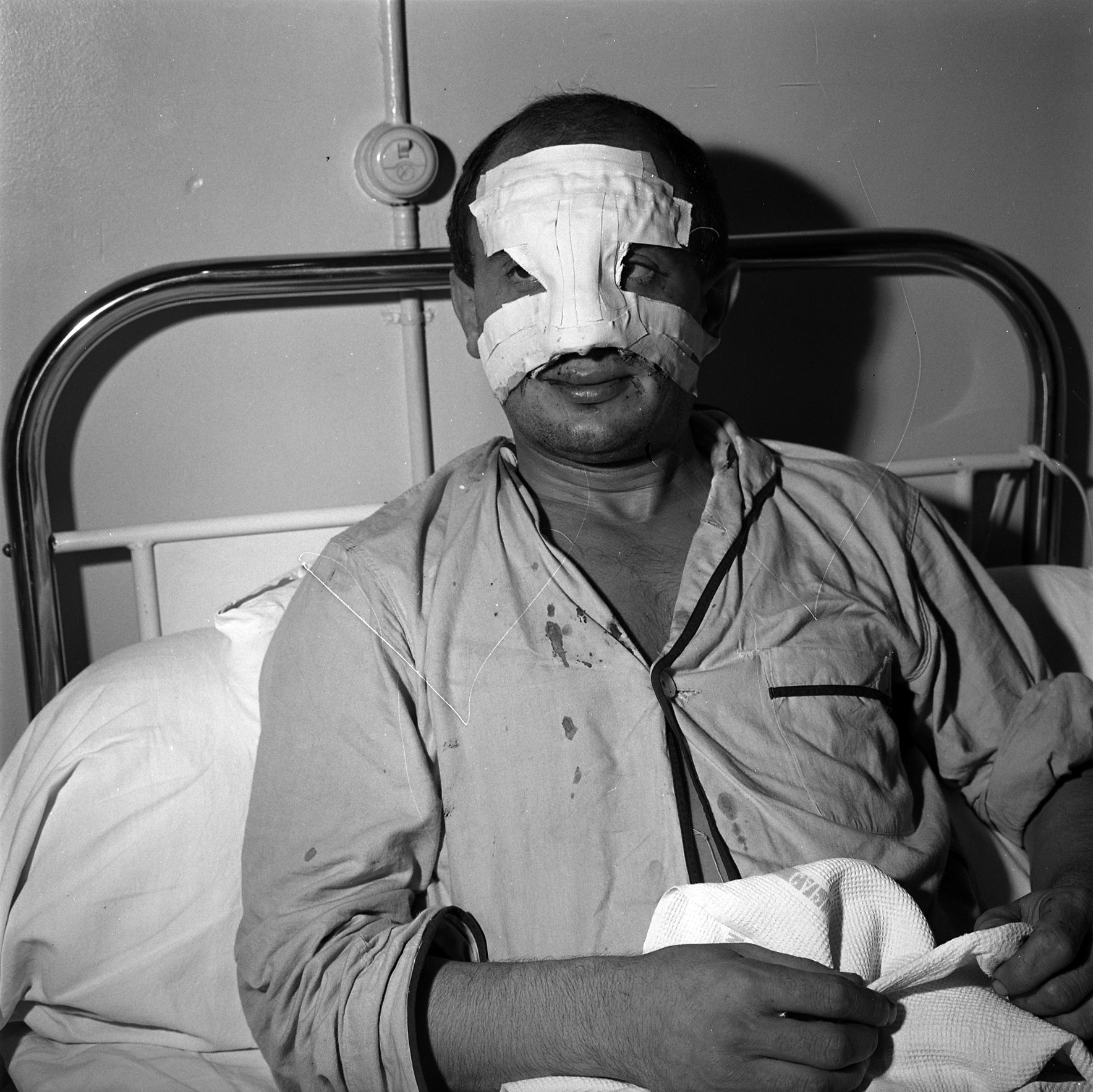 15 octobre 1961. Pierre Lacaze, surnommé "Papillon", joueur du Toulouse Olympique XIII (rugby à XIII). Plan rapproché du joueur sur son lit d'hôpital (vue de face) ; bandage ou plâtre au niveau du visage (nez cassé).